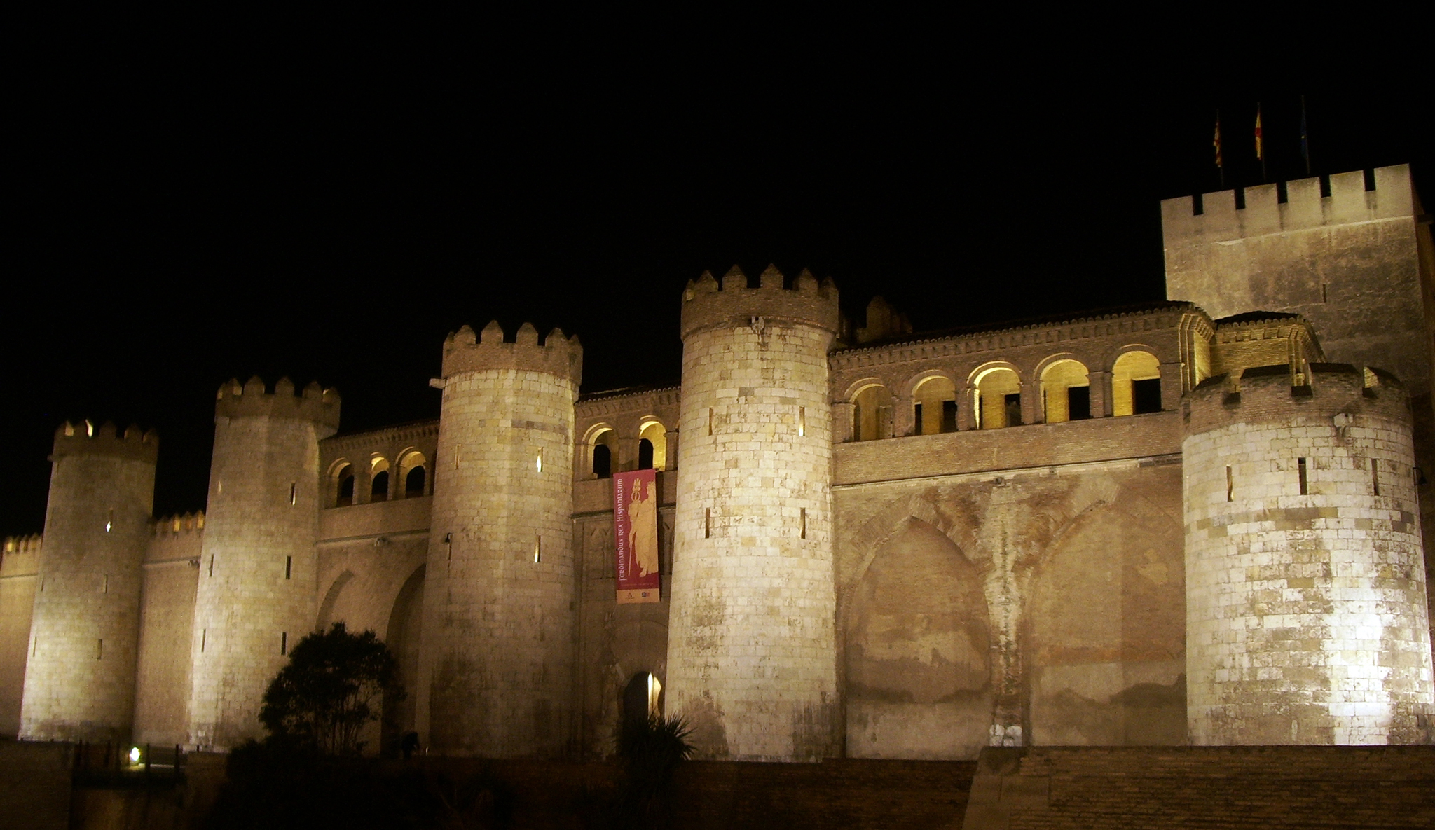 Fachada de la Aljafería (noche)